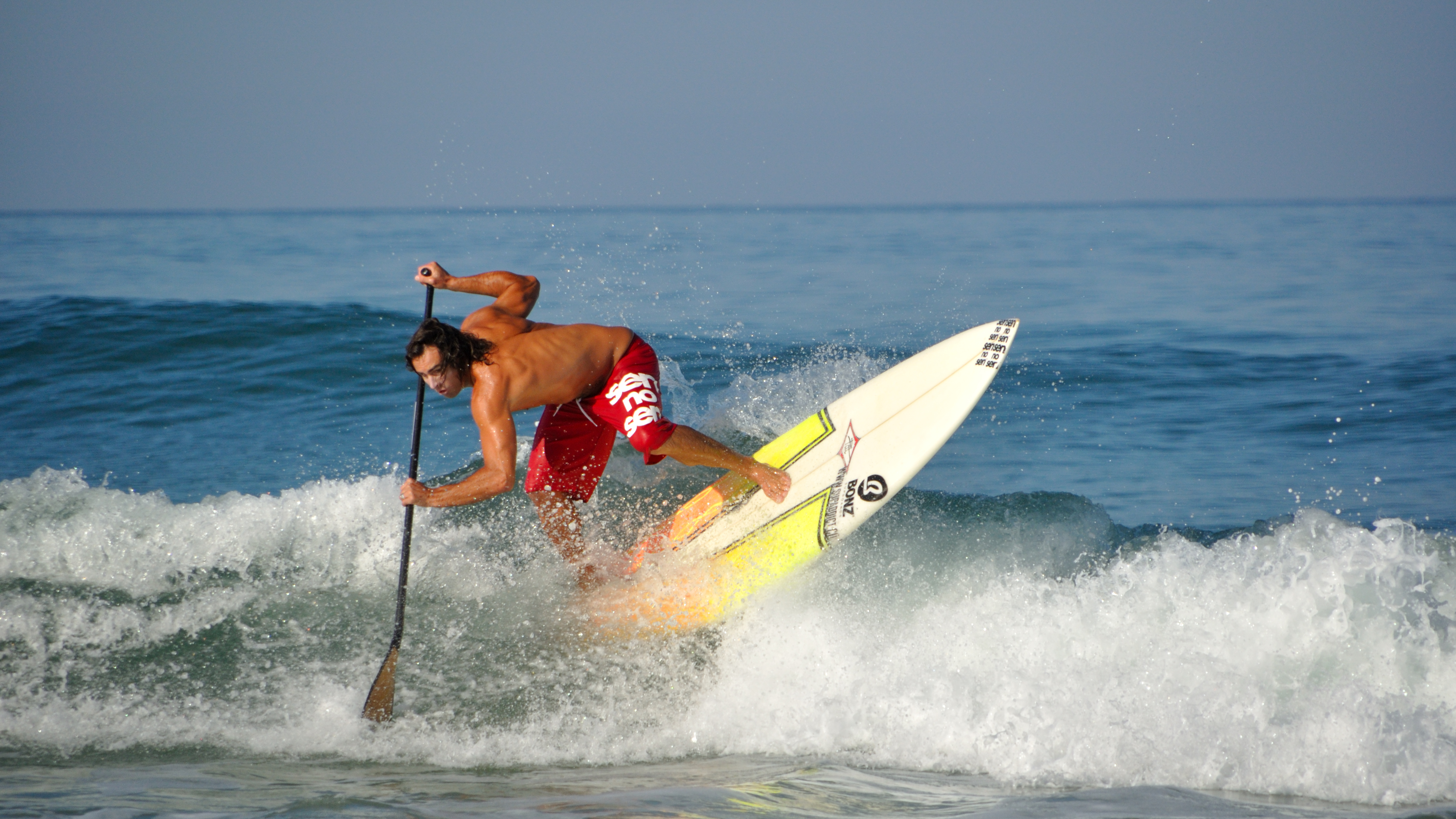 Jérémy Massière (champion de france de SUP 2009) surfant sur la plage de Biscarrosse en septembre 2012